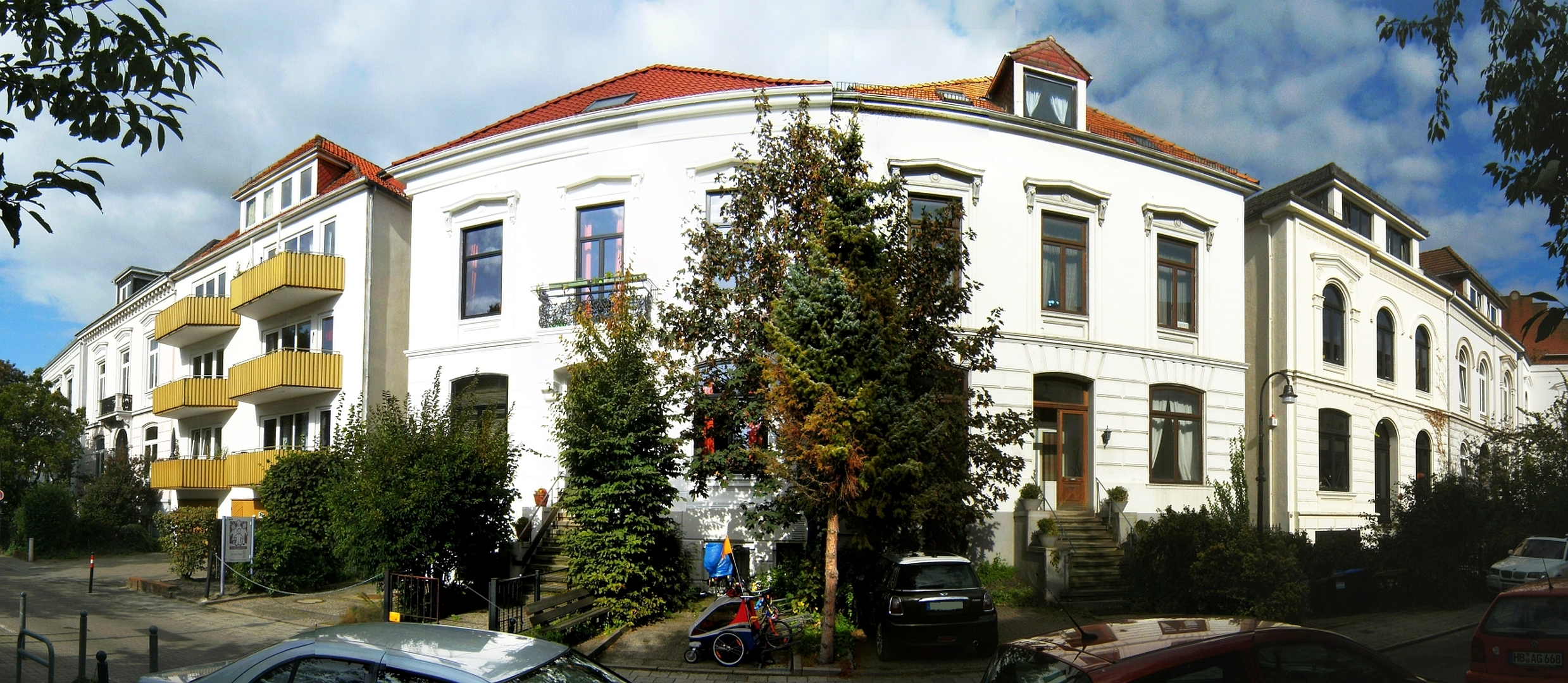 Ensemble Bleicherstraße in Bremen, Bleicherstraße 10-12-14-18-20-22-24Die Denkmalgruppe ist ein geschütztes Kulturdenkmal in der Freien Hansestadt Bremen, mit der Nr. 0644 beim Landesamt für Denkmalpflege registriert.